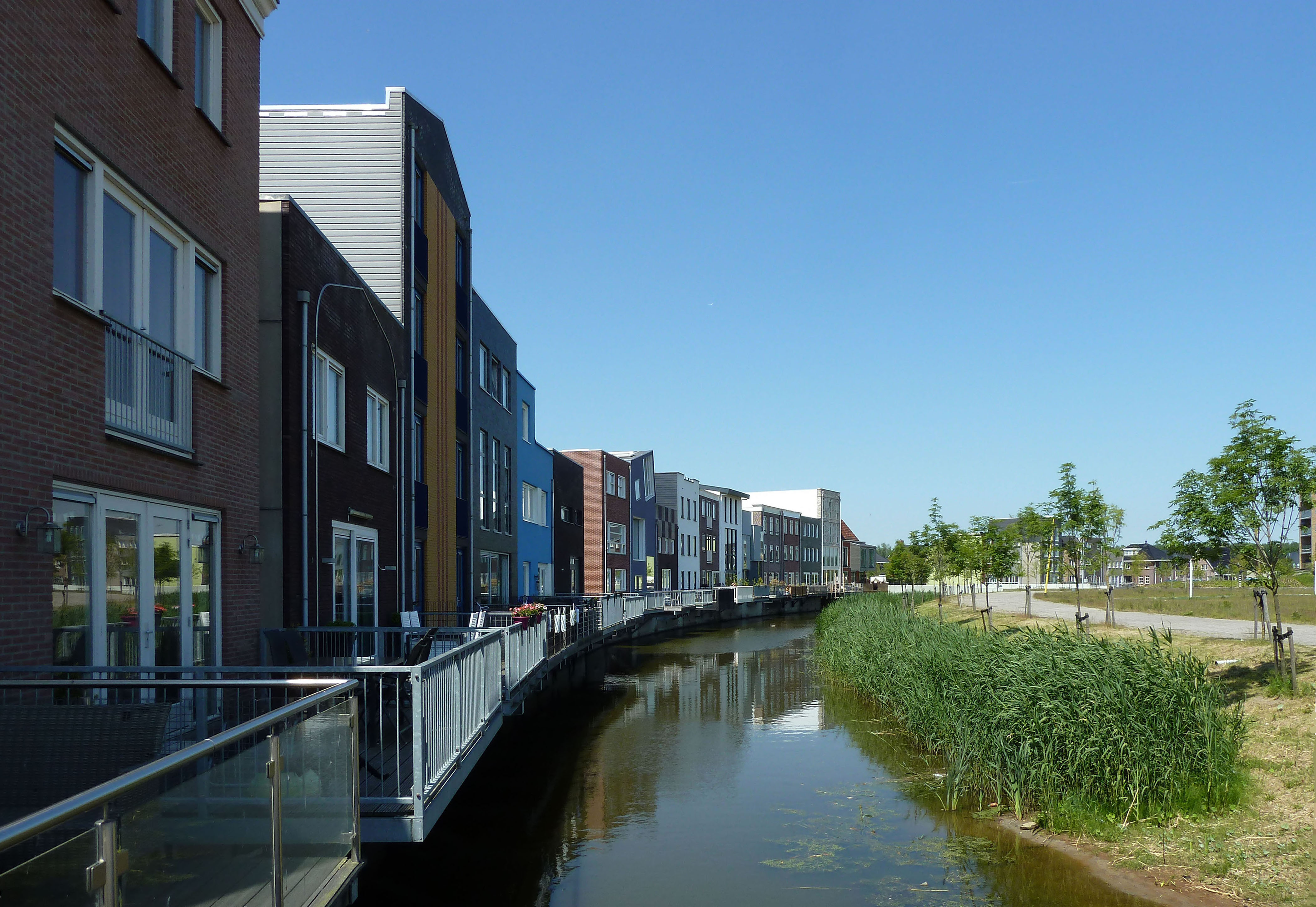 Almere, stadsdeel Almere Poort, Homeruskwartier, Aresstraat waterkant, (bewonersparticipatie 2012)